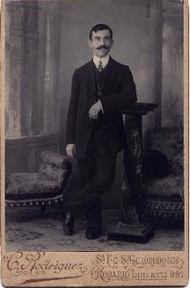 fundadorgp